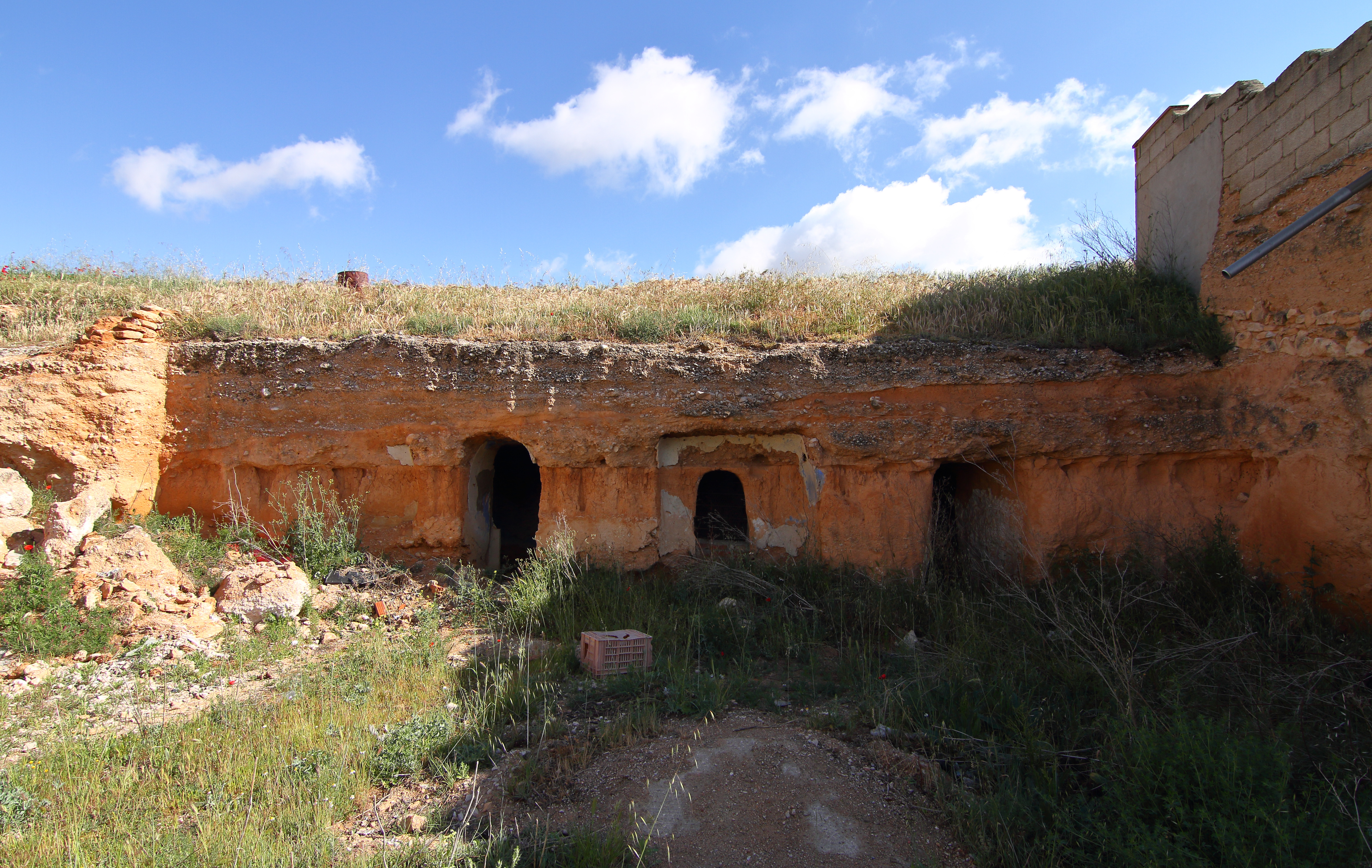 Casas de Juan Nuñez, casas cuevas en calle San Pedro, 01